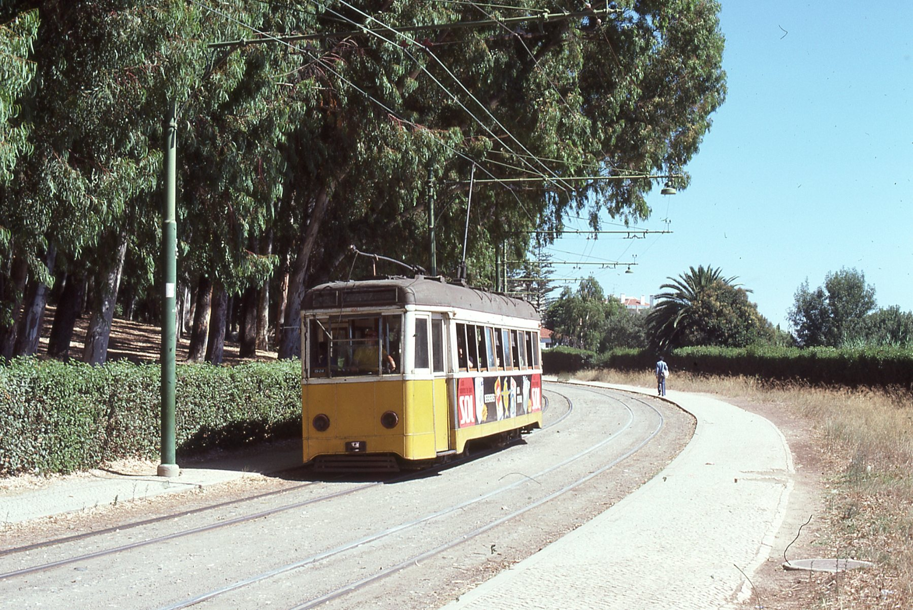 Ligne 15 cette ligne existe encore à ce jour, mais avec des trams modernes, et la ligne ne va plus à ESTADIO: Estadio (terminus de la ligne en 1977) Tram 902 de la série 901-910, de cette série, il ne reste que le tram 904 au musée des trams de Lisbonne et le 910 au Japon